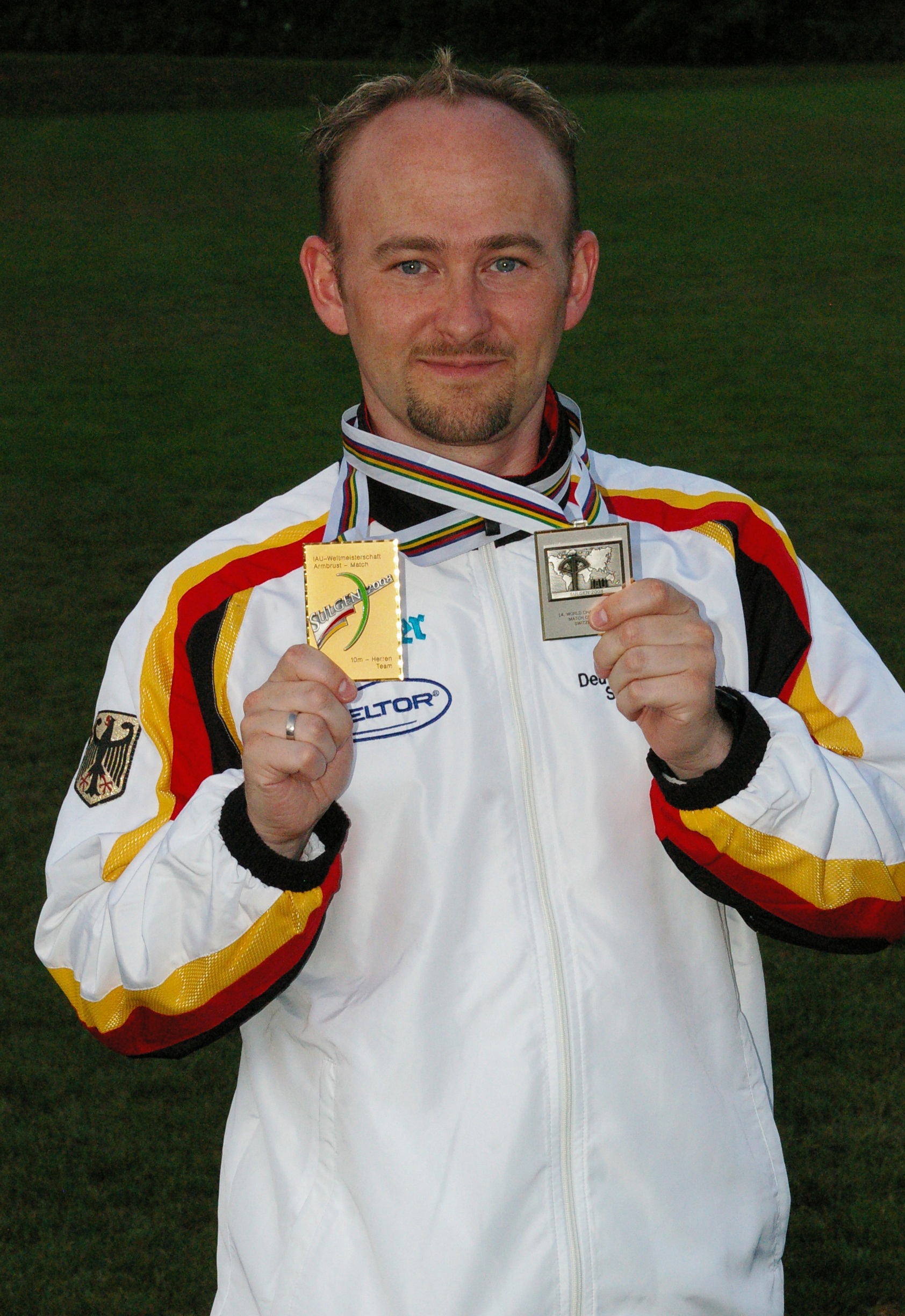 Joachim Vogl am 10.07.2008 bei der 14. Armbrust-Weltmeisterschaft in Sulgen/CH